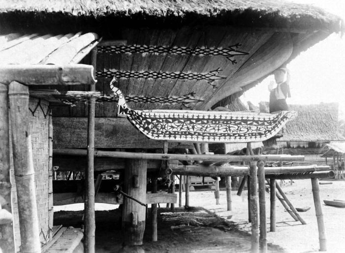 Negatief. Een doodskist te Bunuraja, Karo, Noord-Sumatra